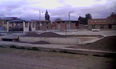 Foto panoramico de la poblacion Calasaya